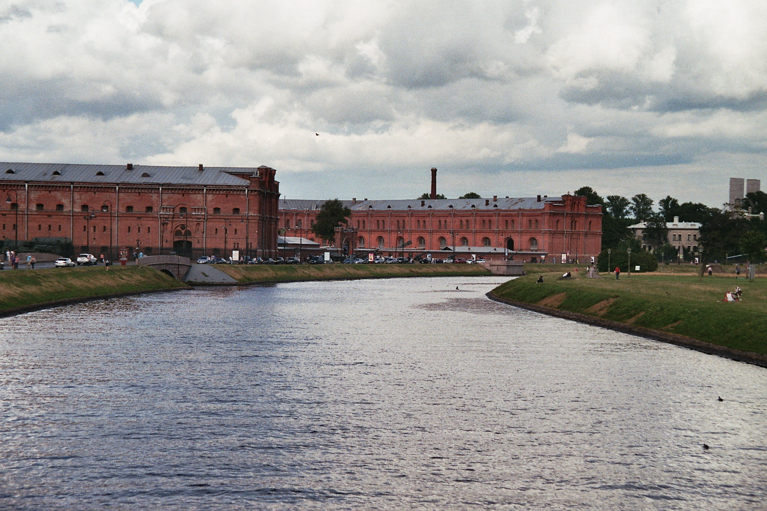 Peter-und-Paul-Festung in Sankt Petersburg